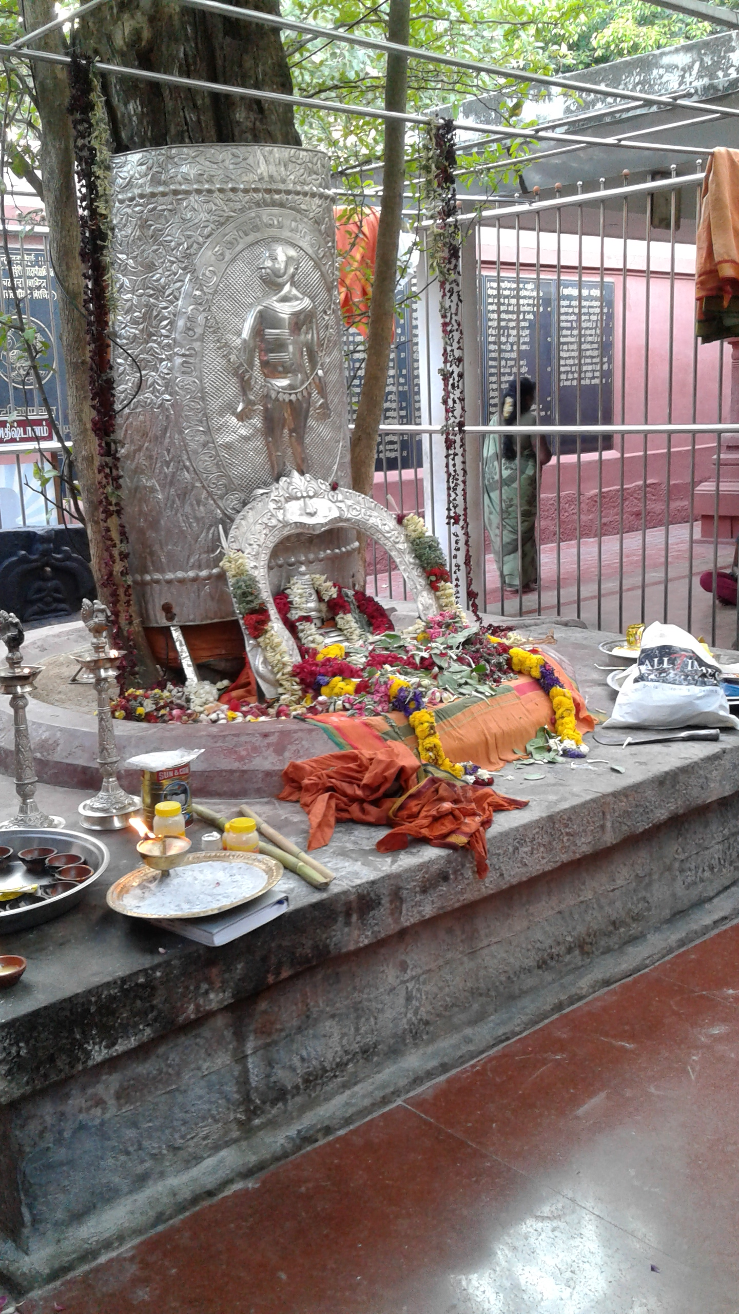 சதாசிவ பிரம்மேந்திரர் ஜீவசமாதி